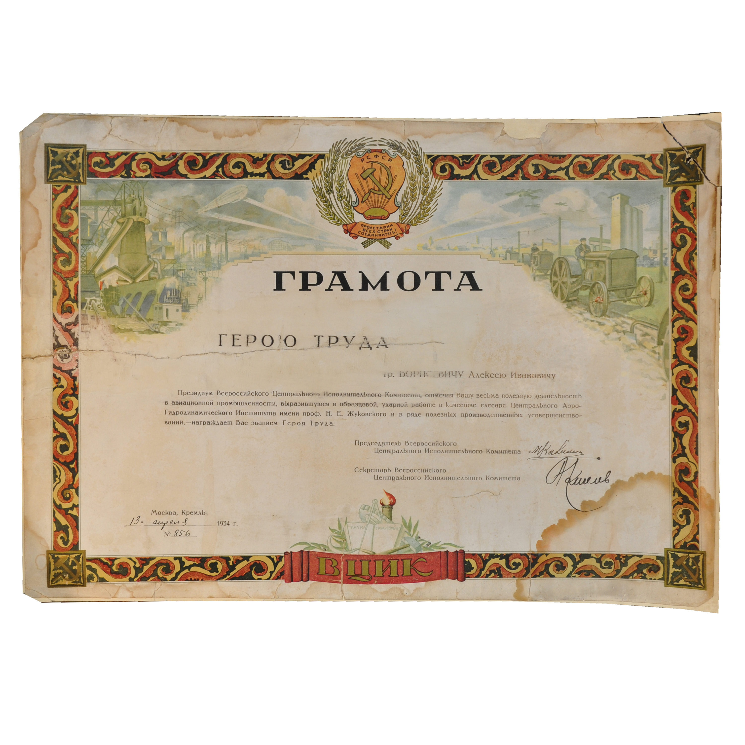 Грамота Алексея Ивановича Борисевича, слесаря ЦАГИ, 13 апреля 1934